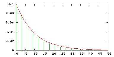 Comparaison d'une loi géométrique et d'une loi exponentielle; Image personnelle créée avec Gnuplot.